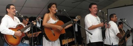 GrupoPancasán_en_concierto_2014